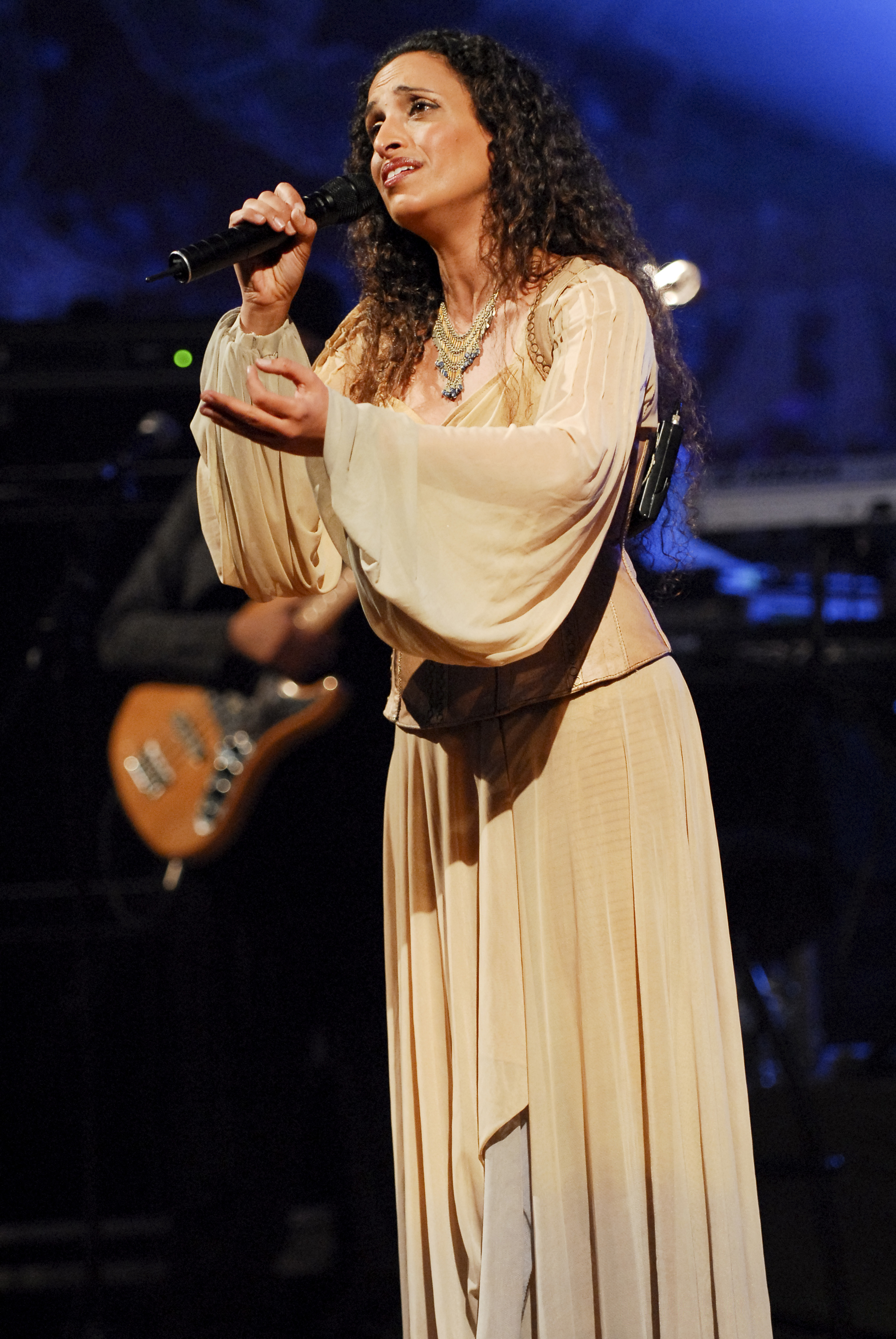 Noa